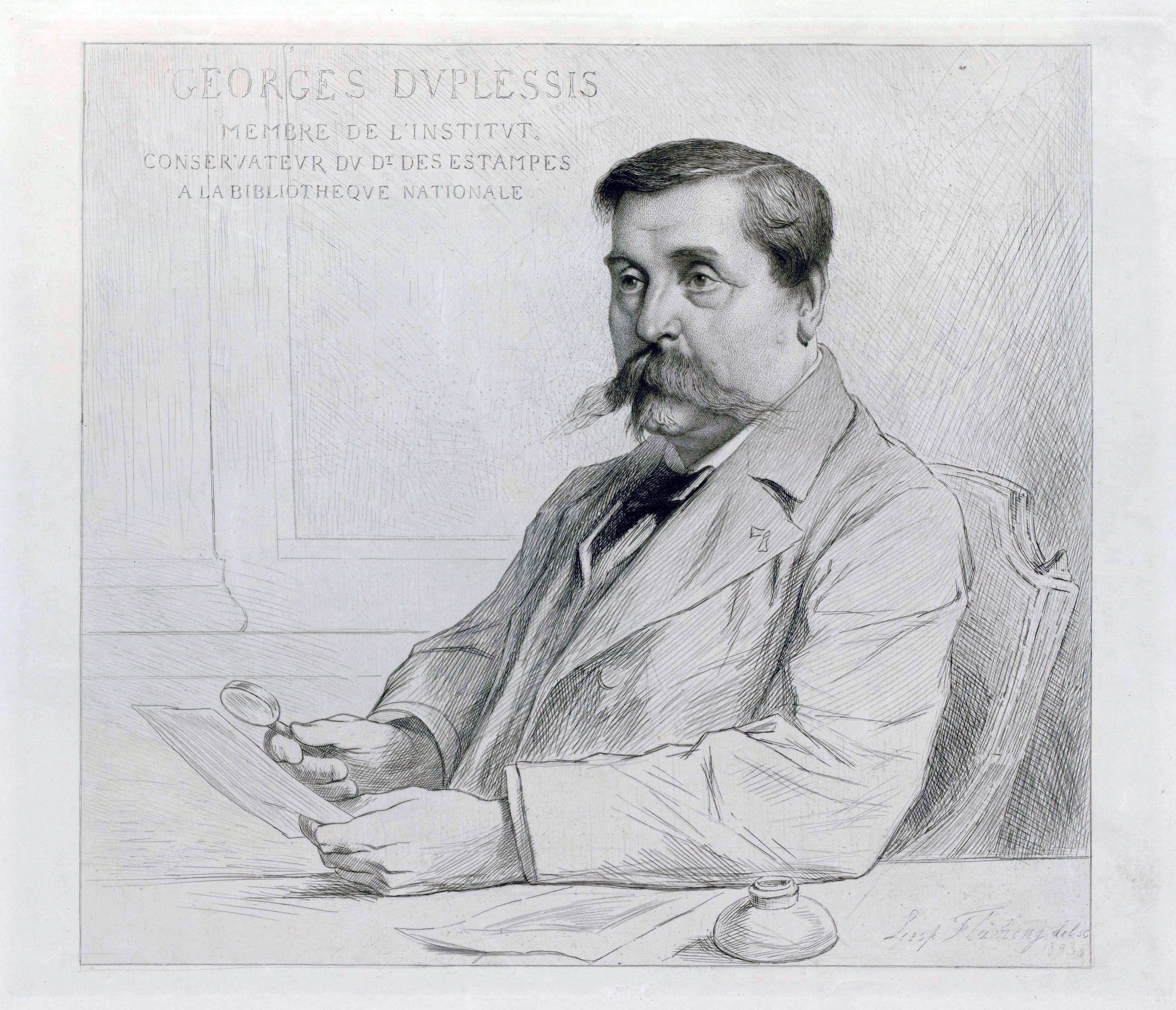 Portrait de Georges Duplessis, membre de l'Institut, conservateur du département des Estampes de la Bibliothèque nationale